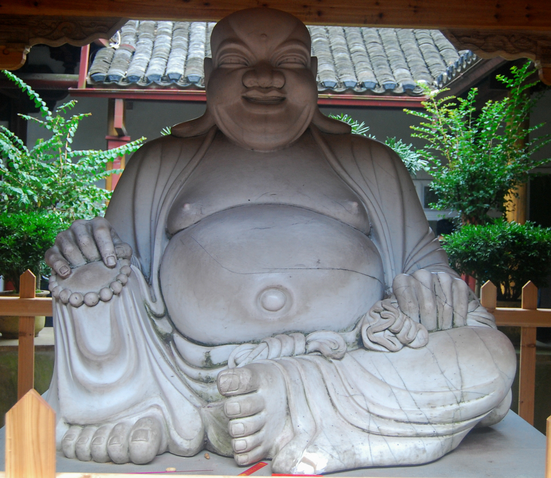 中文（中国大陆）: 普陀山惠济寺弥勒佛